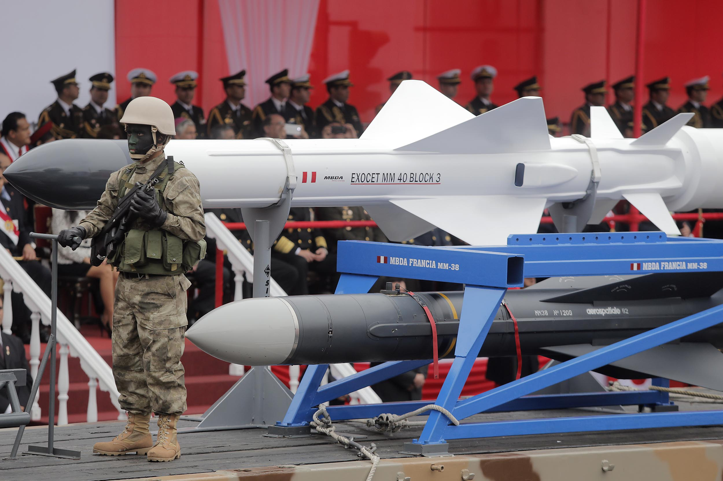 El Presidente de la República, Ollanta Humala Tasso y el ministro de Defensa, Pedro Cateriano Bellido, junto a autoridades de gobierno y altos mandos de las fuerzas armadas, presidieron la ceremonia del Desfile Cívico Militar por el 192 Aniversario de la Independencia del Perú.